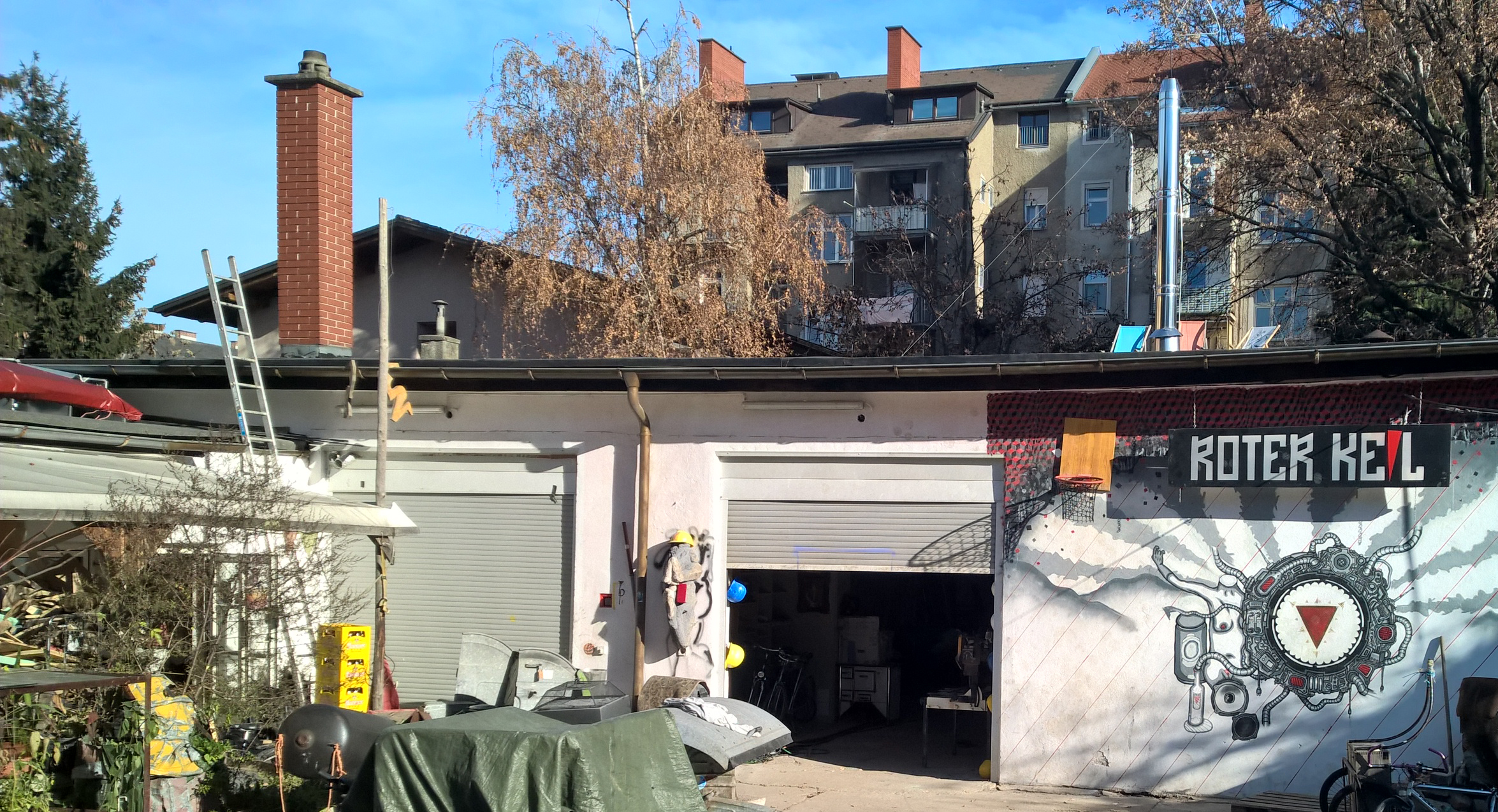 Das erste Atelier vom Kunstverein Roter Keil in Graz, Bezirk Gries. Außenansicht im November 2015